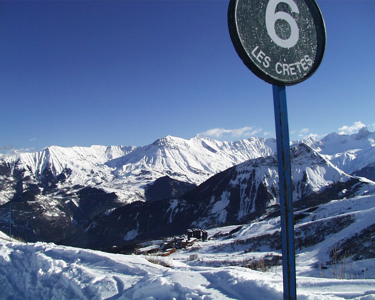 Photographie de la station du Corbier dans le domaine skiable des Sybelles, prise par Accrochoc en janvier 2003.